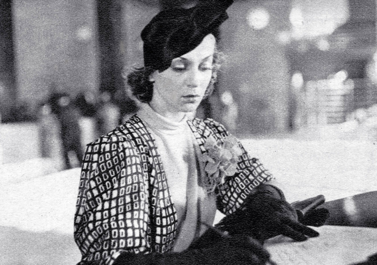 Fulvia Lanzi de "Lo squadrone bianco" (Genina, 1936)